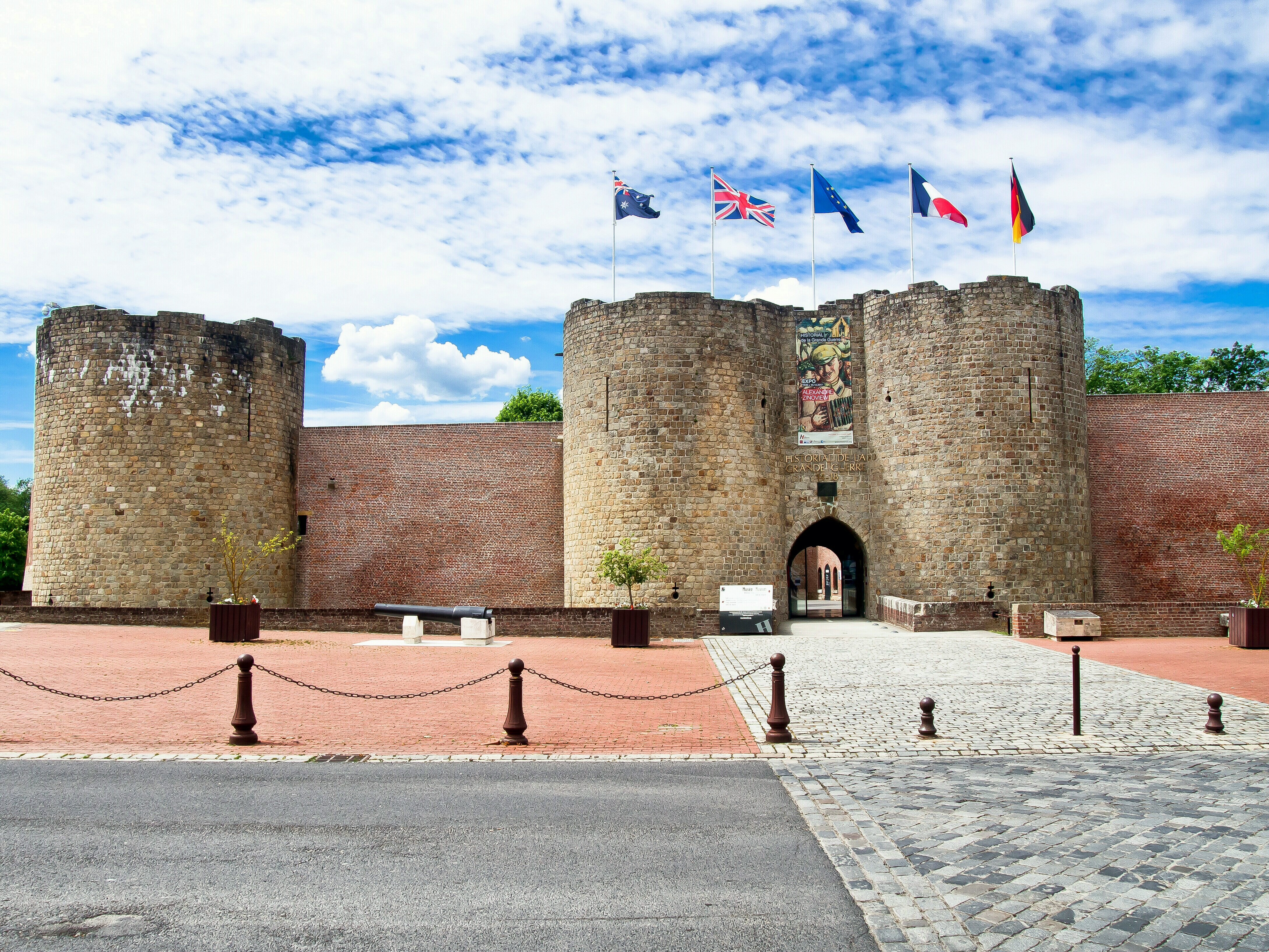 Château de Péronne, Historial de la Grande Guerre